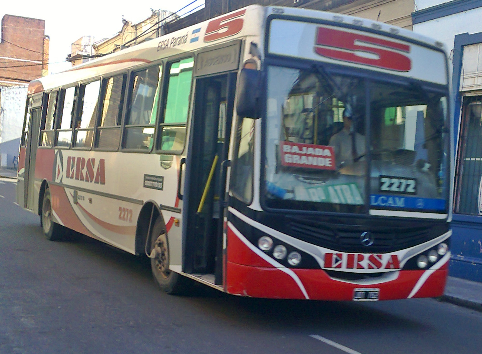 Colectivo Línea 5, Interno 2272, Empresa ERSA Urbano S.A. - Ciudad de Paraná, Entre Ríos, Argentina - ColectivosEntreRios.